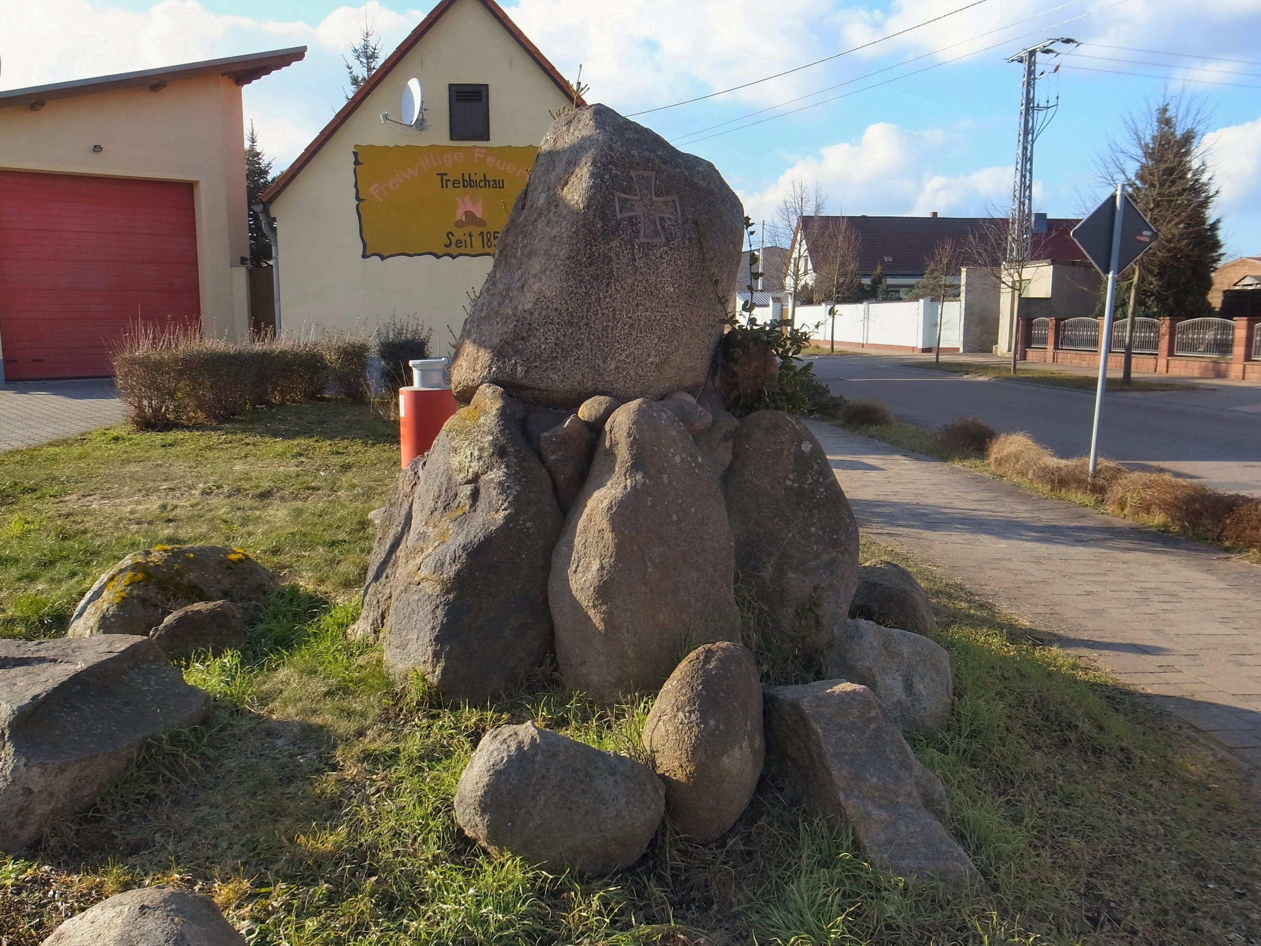 Trebbichau, Osternienburger Land, Denkmal 1813-1913. Inschrift: 18. October 1813 :: 1913 (Baudenkmal im Denkmalverzeichniss Sachsen-Anhalt, Erfassungsnummer: 094 70446 000 000 000 000 [1])